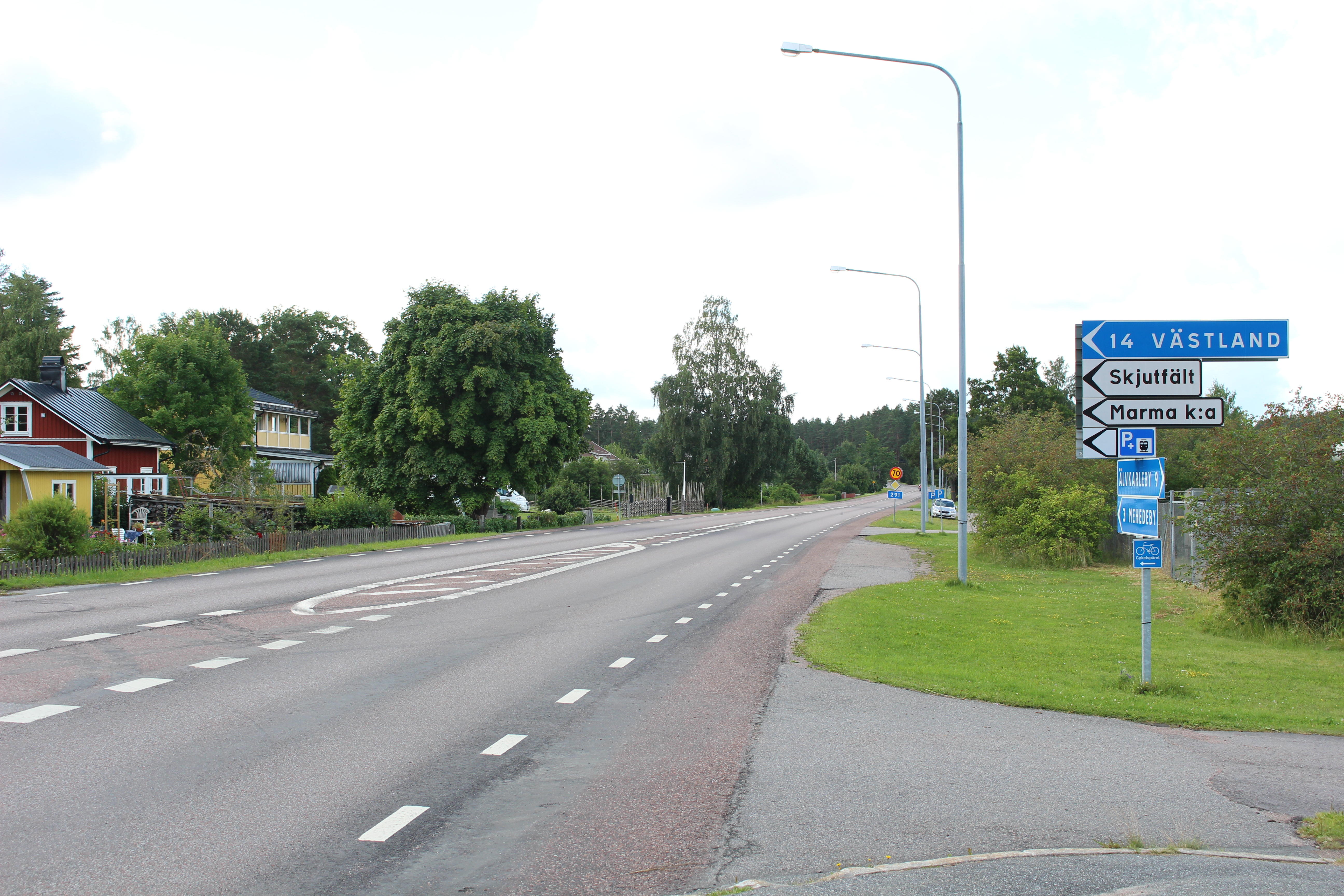 Länsväg 291 mot söder i Marma.